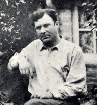 Portrait d'Eugène Atget (1857-1927)